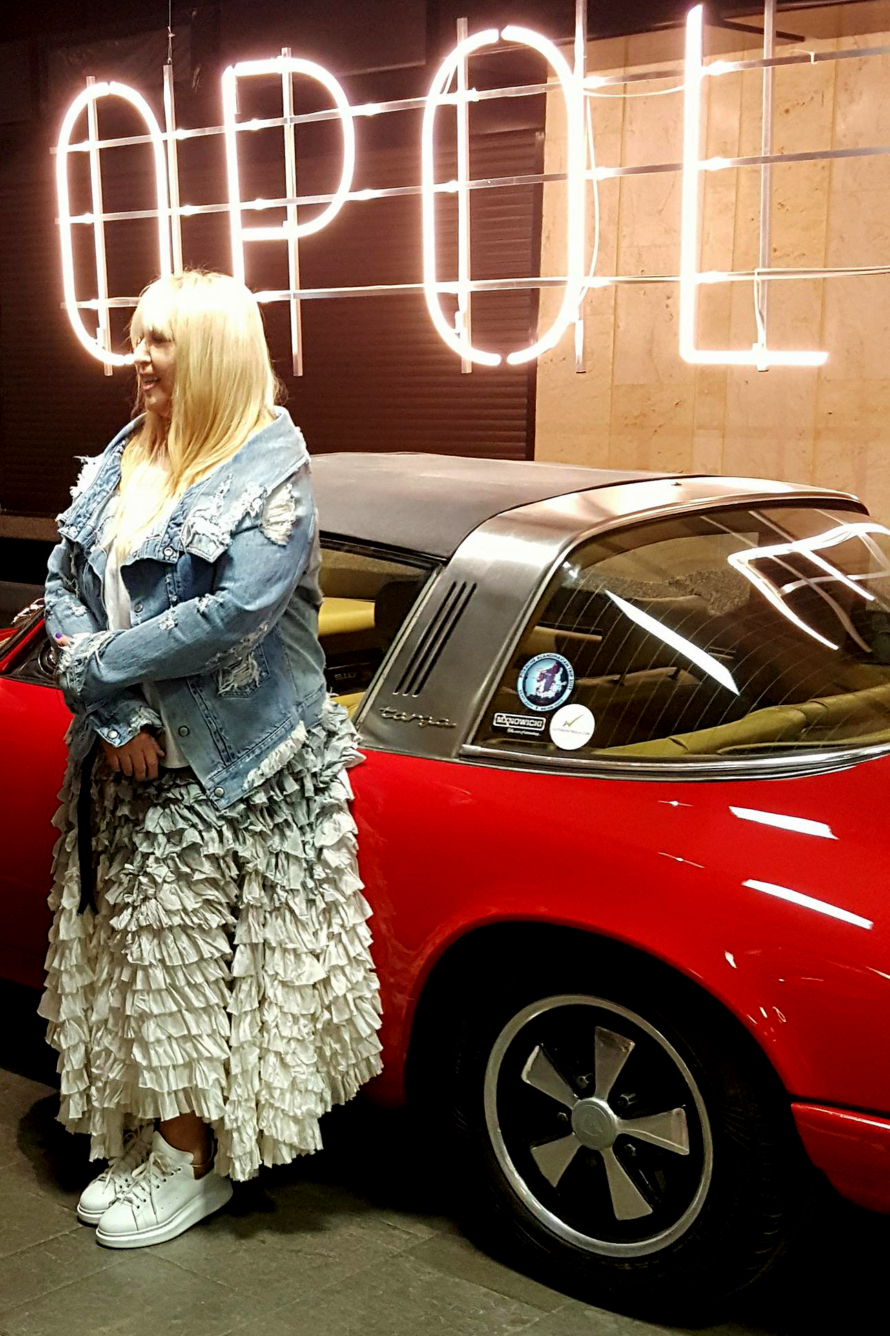 Polska artystka Maryla Rodowicz na finisażu wystawy "Wszystkie Małgośki świata", kwiecień 2018.